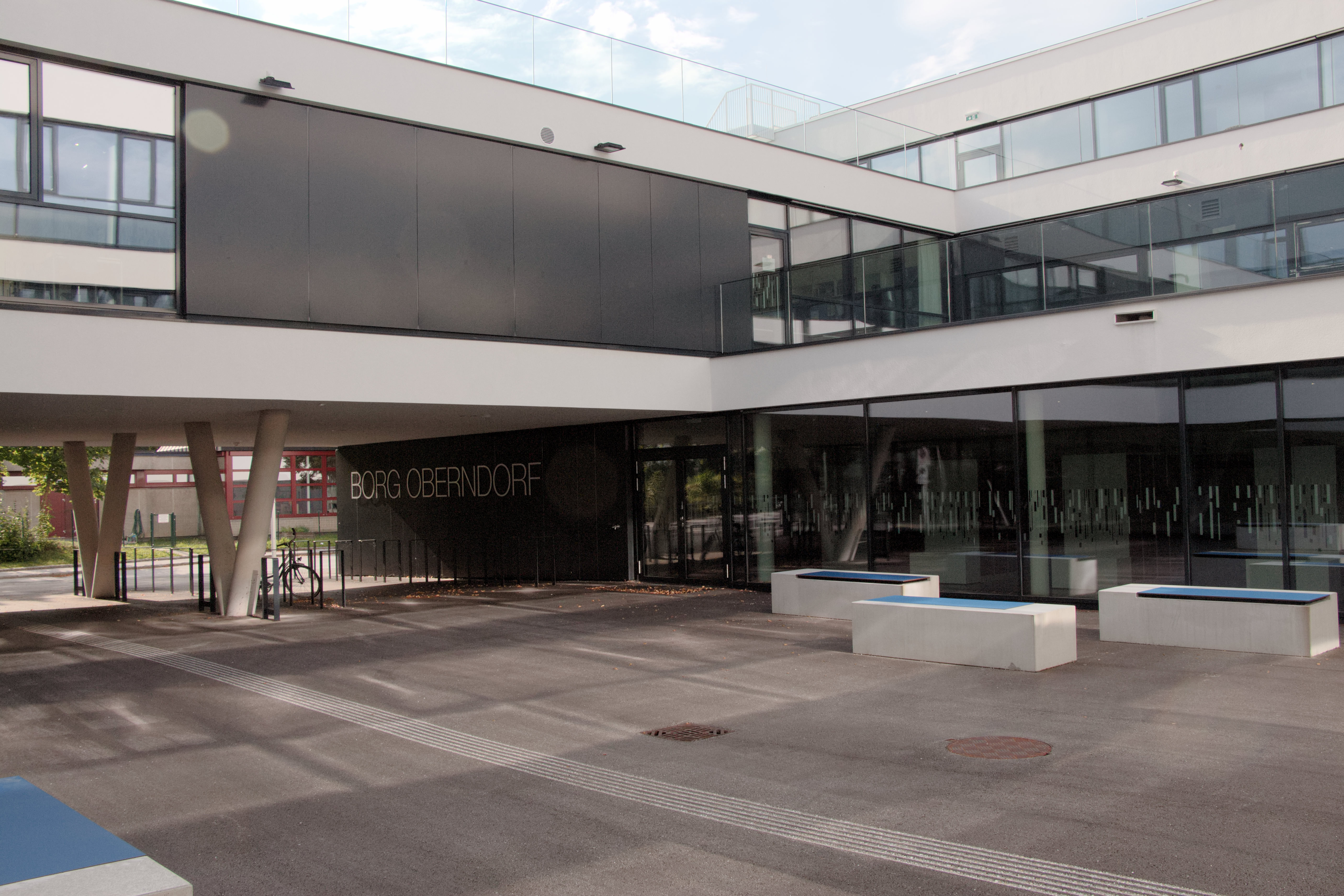 Oberndorf bei Salzburg: Das 2018 fertiggestellte neue Gebäude des BORG Oberndorf - Hofbereich